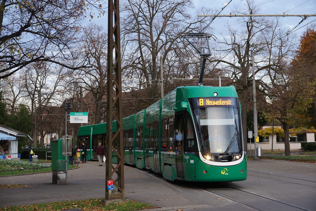 Un bombardier flexity outlook à bale